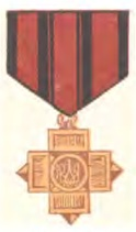 Хрести Заслуги, проект №1.